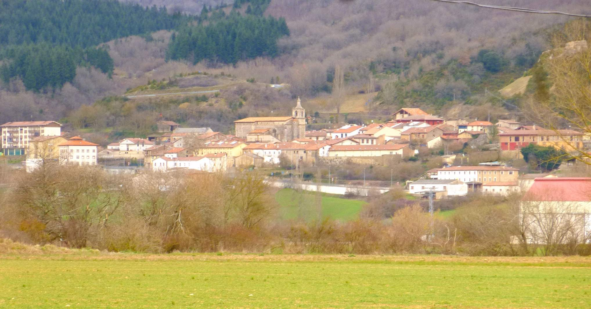 Bernedo (Álava)